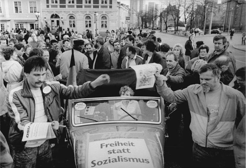 ADN-ZB Franke 11.3.90 roe Potsdam: Wahlkampf-SPD. Am Rande einer SPD-Wahlveranstaltung traten auch "Werbevertreter der DSU" in Aktion und warben für ihre Partei."